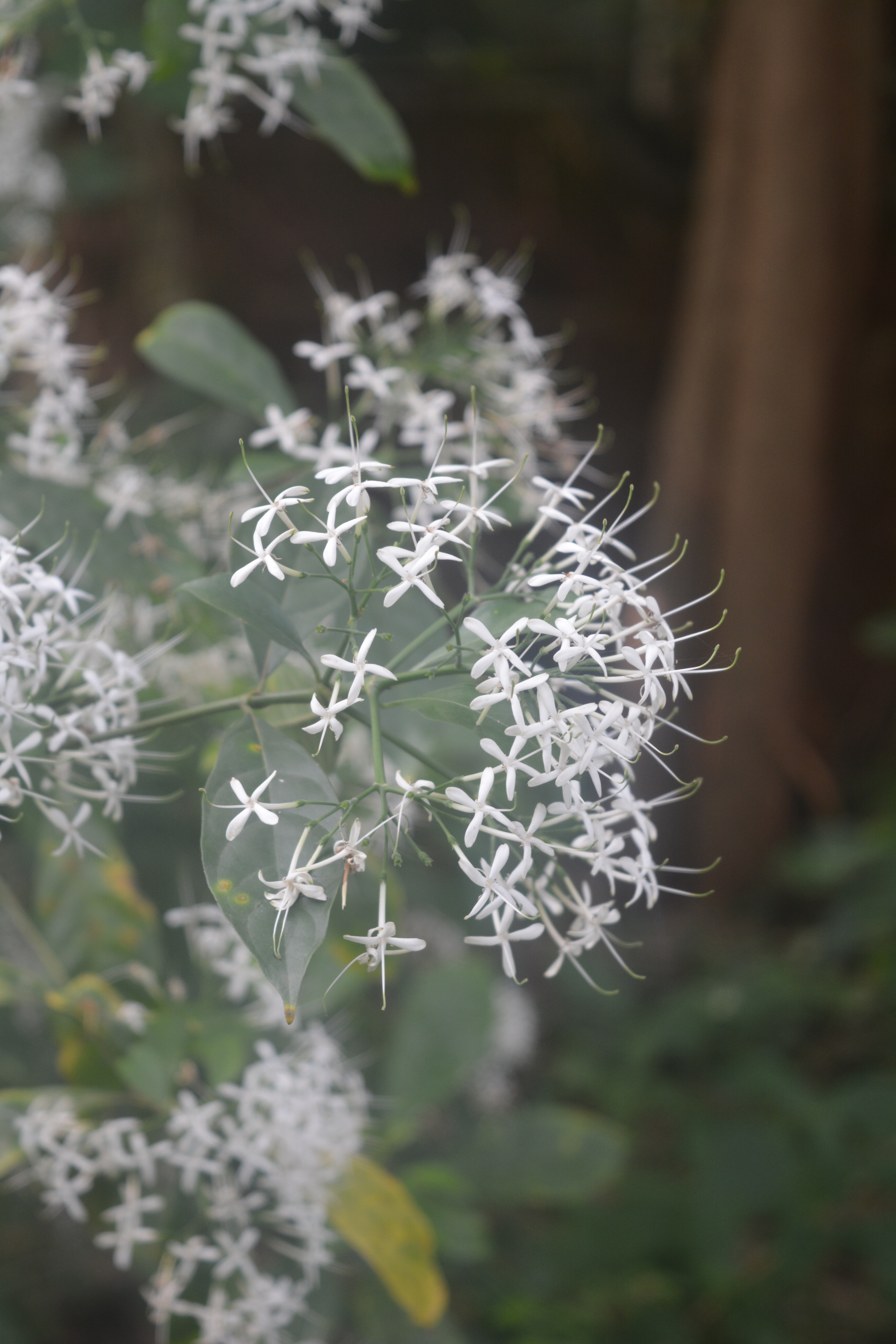 Photos by Vinayaraj